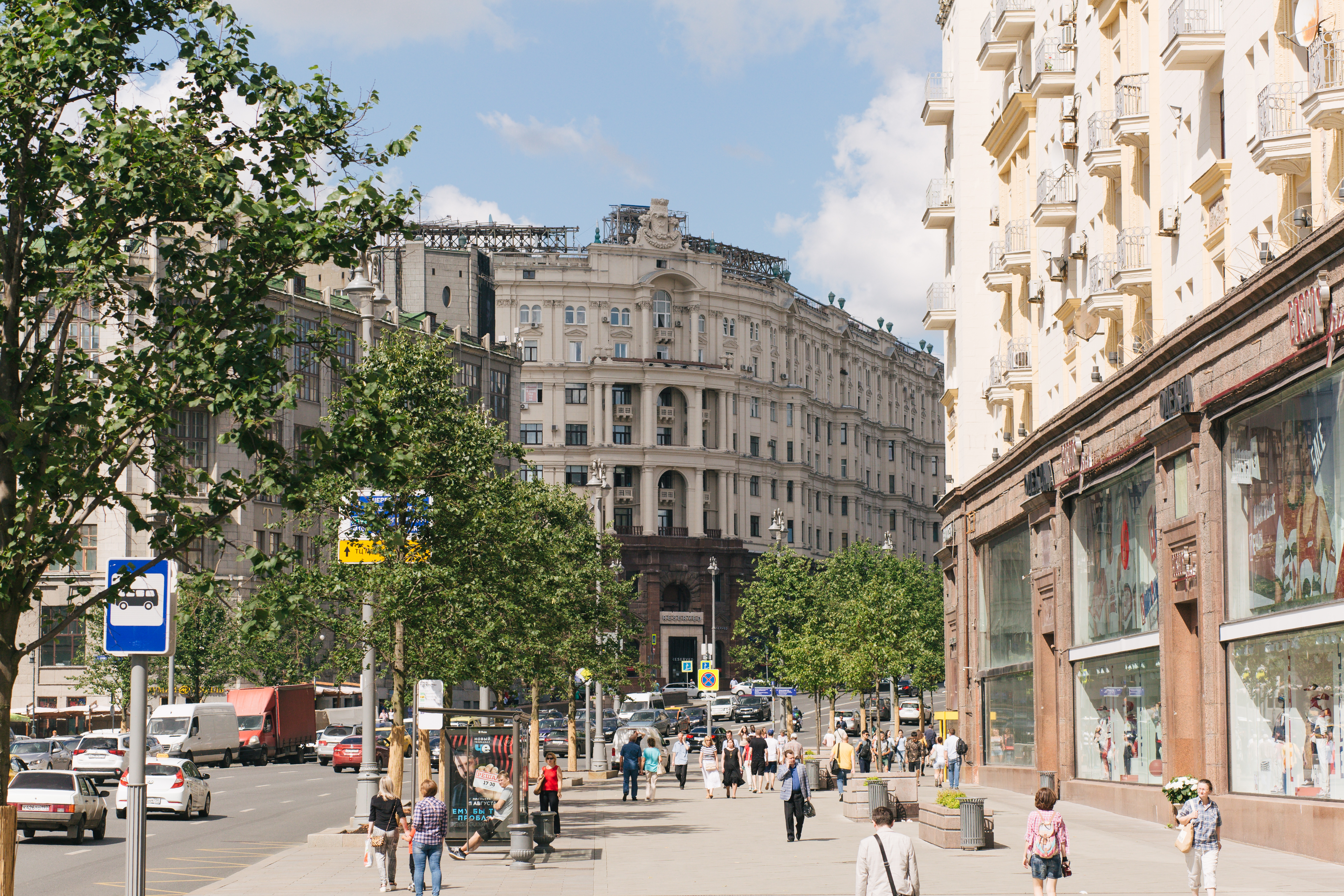 Улица Тверская после реконструкции по программе "Моя улица"